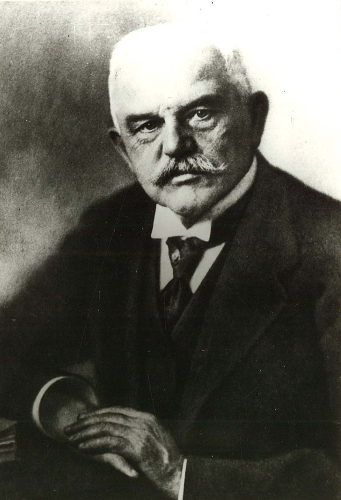 Fotografie des Hamburger HNO-Arztes Prof. Dr. Arthur Thost